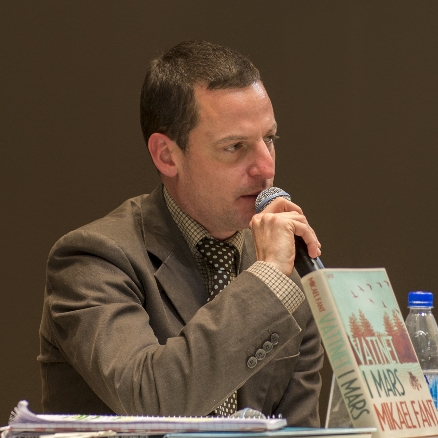 Mikael Fant på Bokmässan 2013. Bilden är en retuscherad version av Mikael Fant, Bokmässan 2013 (crop A).jpg.